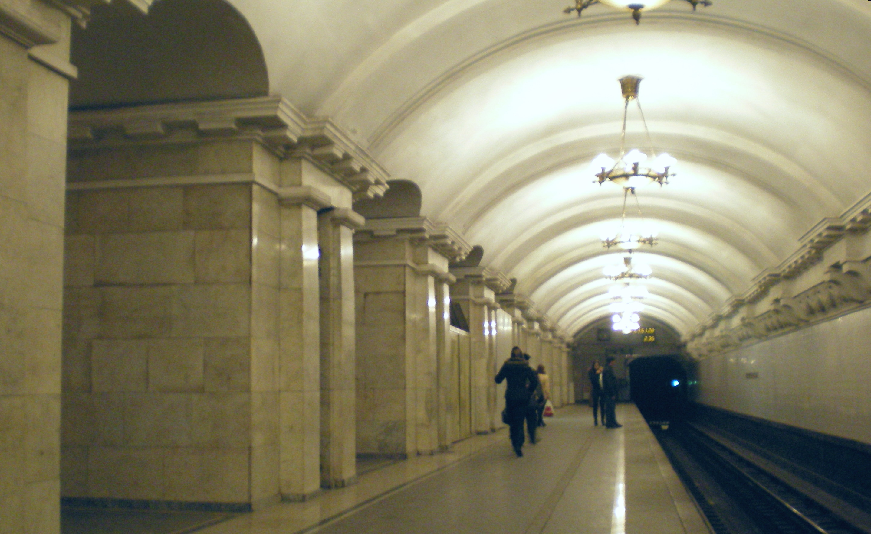 Станция «Пушкинская», платформа и глухая стена